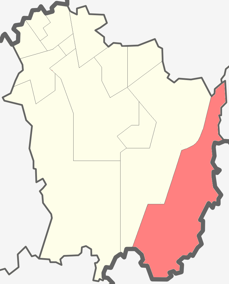 Трубникоборское сельское поселение Тосненского района Ленинградской области